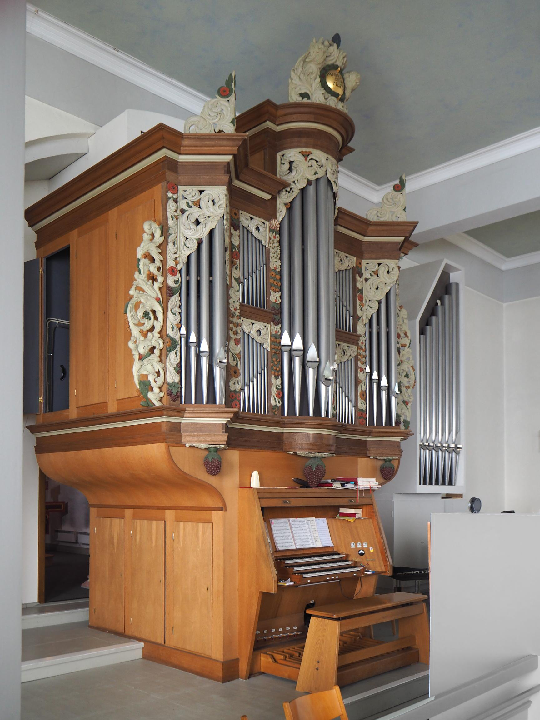 Wermelskirchen (NRW),Ev. Stadtkirche, Orgel, Foto: Juli 2015